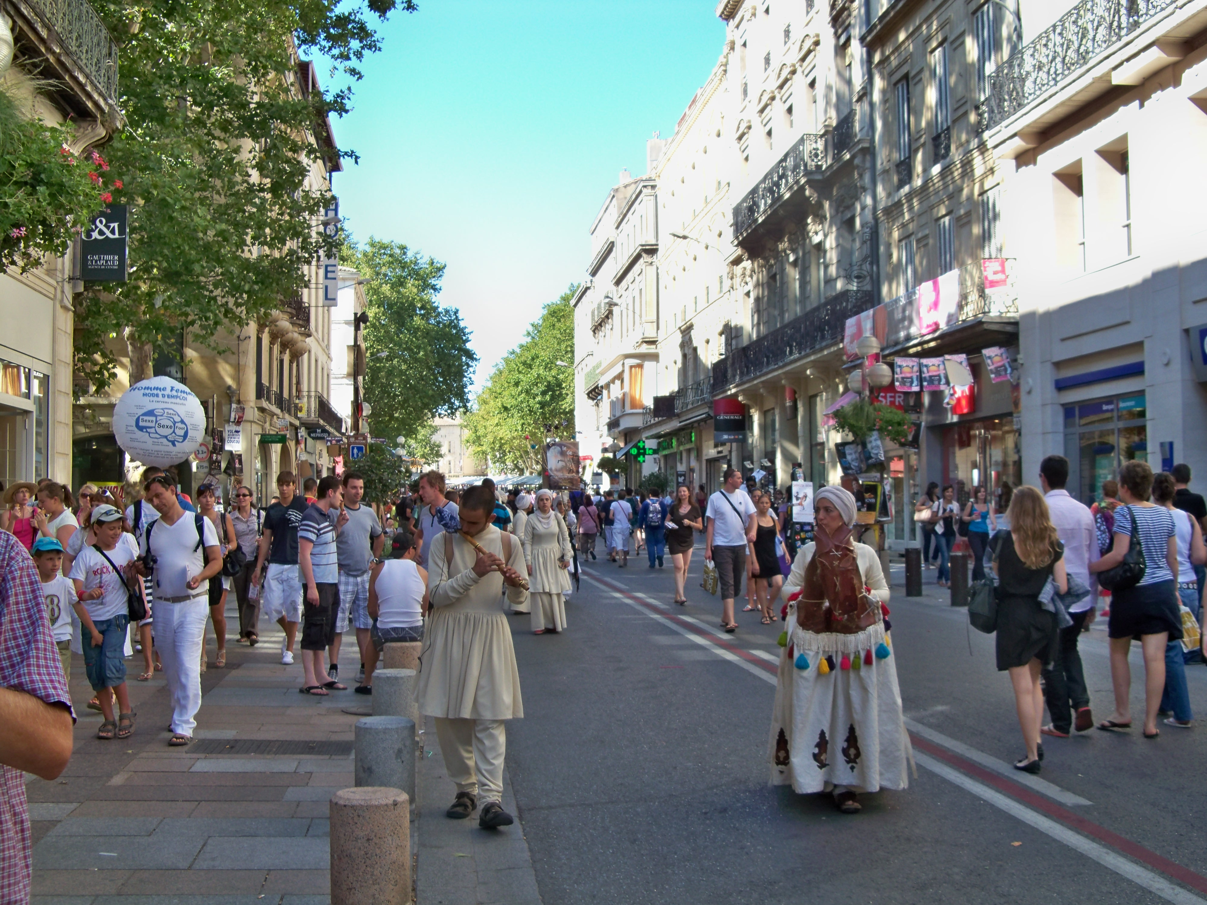 Ambiance Festival d'Avignon 2010, rue de la République